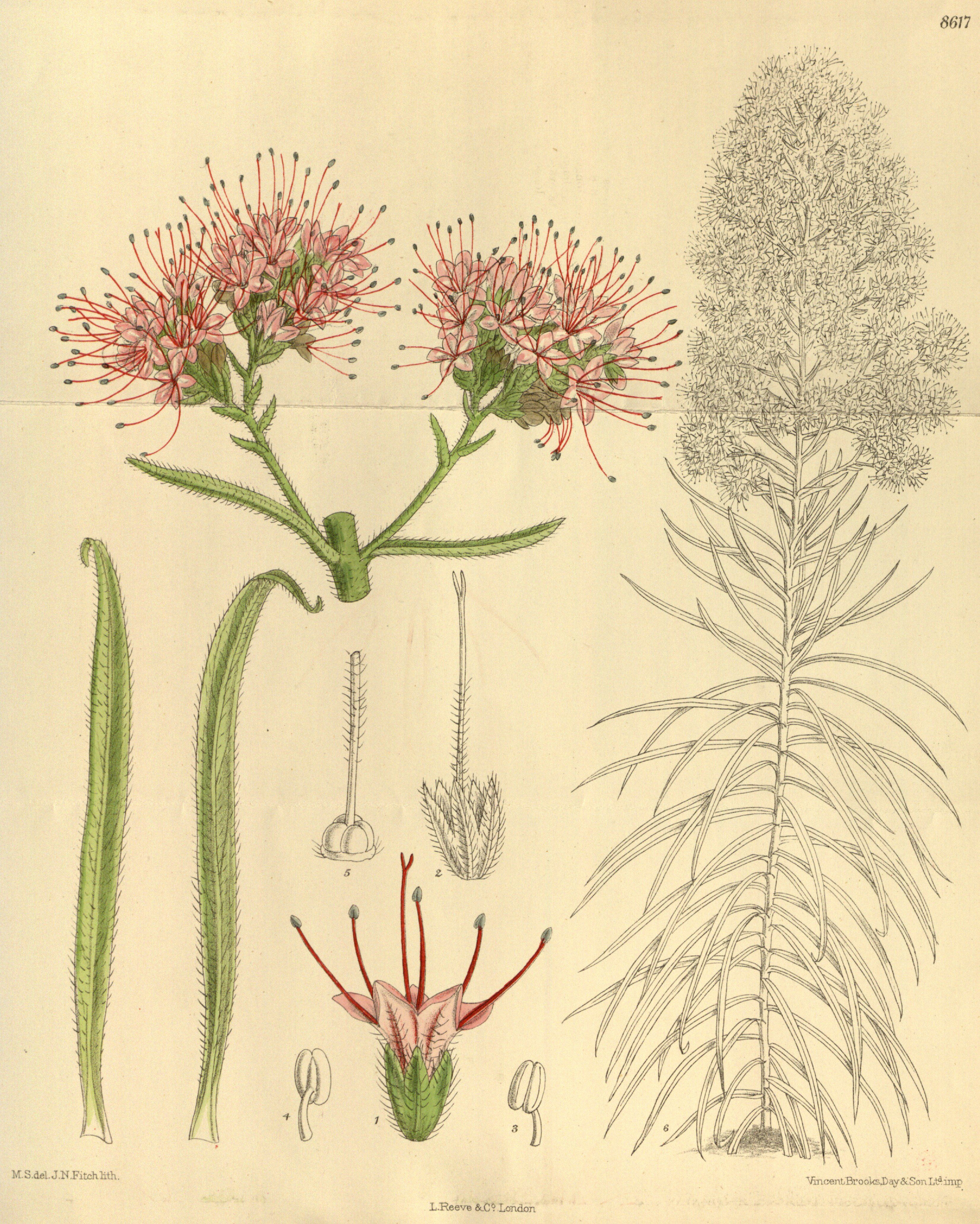 Echium perezii (= Echium wildpretii subsp. trichosiphon), Boraginaceae